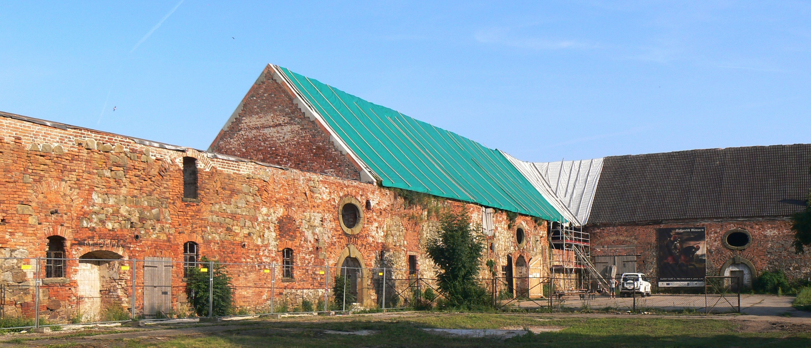 Das historische Stallgebäude wurde durch den Förderverein Hofgestüt Bleesern e. V. vor dem Abbruch gerettet und die Bausubstanz teilweise gesichert.